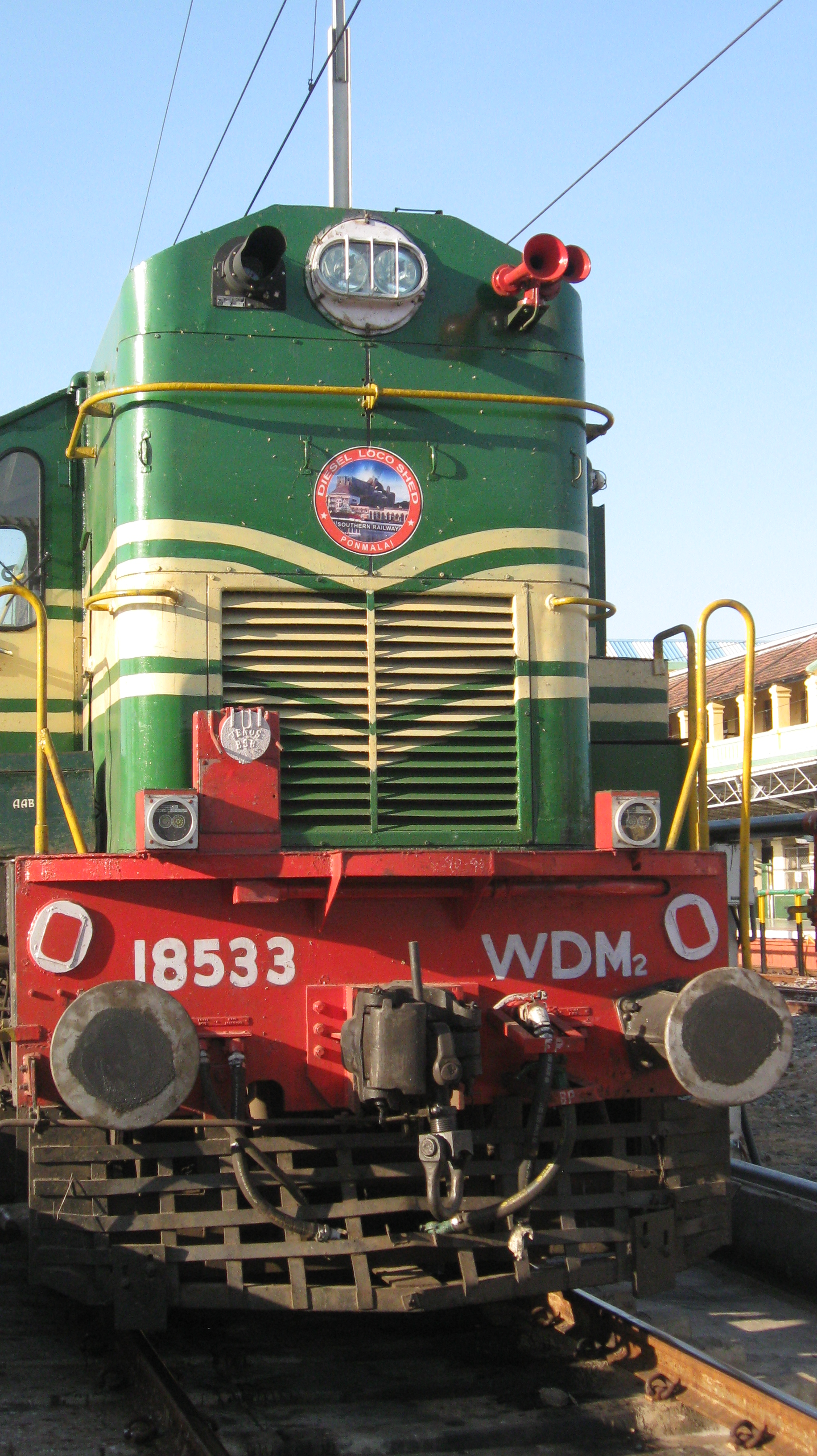 சதர்ன் ரயில்வேயின் ரயில் என்ஜினில் ஒன்று